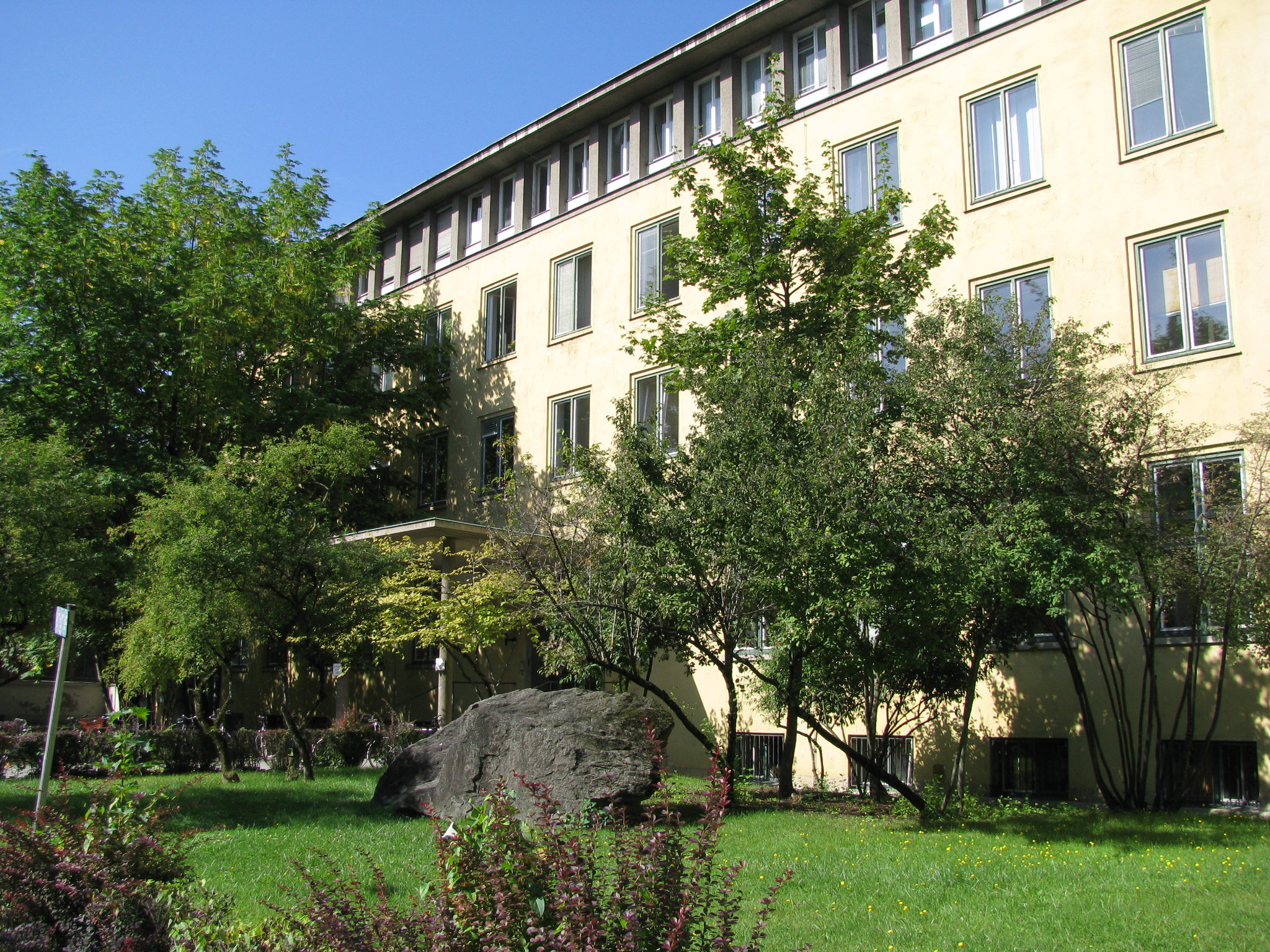 Das Gebäude Luisenstraße 37 der LMU München (Institut für Allgemeine und Angewandte Geologie) beherbergt das Geologische Museum München